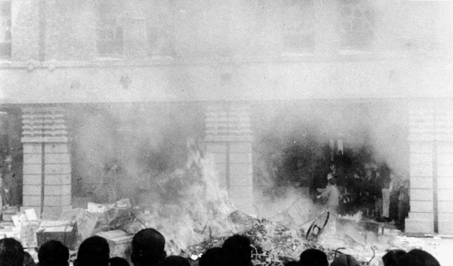 中文（台灣）: 二二八事件